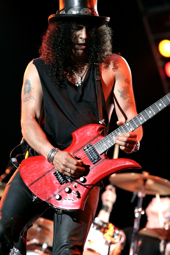 Velvet Revolver - SlashSlash